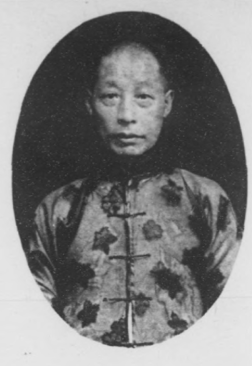 光緒甲辰科進士小像